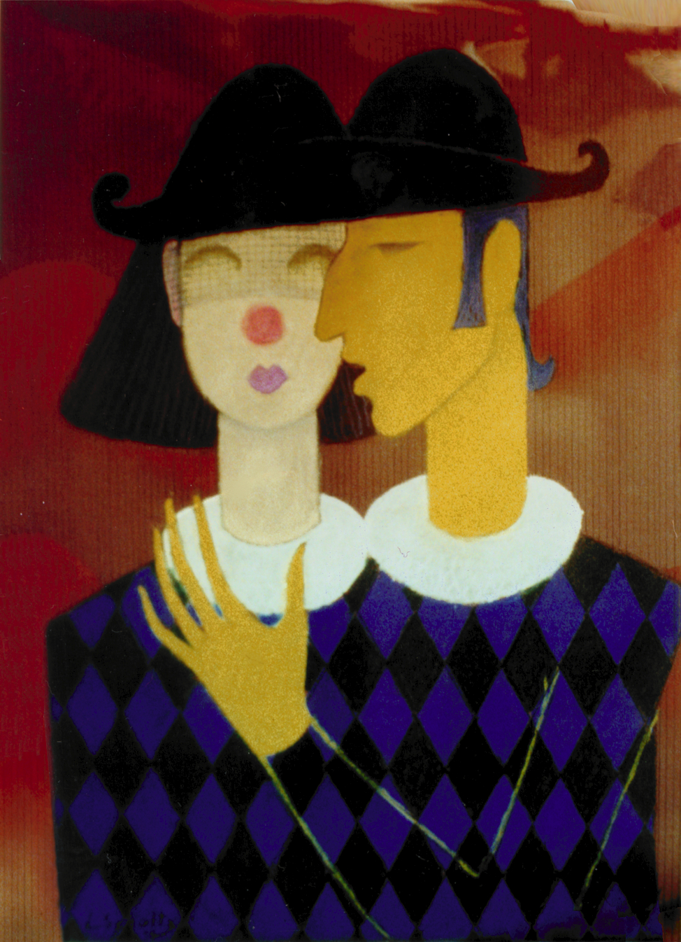 Копия пастели Льва Шульца "Актёры". 1964